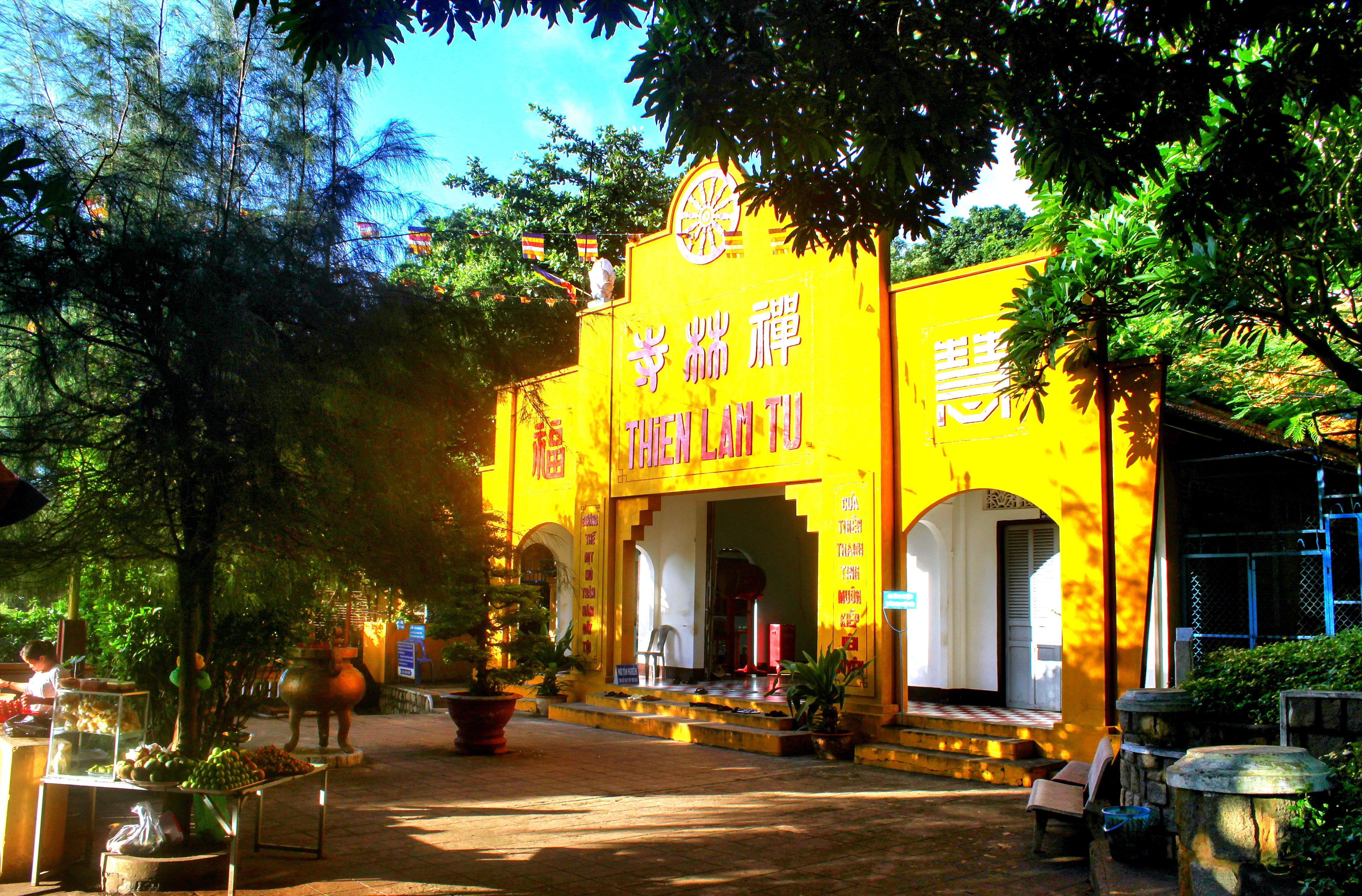 Thiền Lâm Tự trong quần thể Thích Ca Phật Đài ở thành phố Vũng Tàu, Việt Nam..